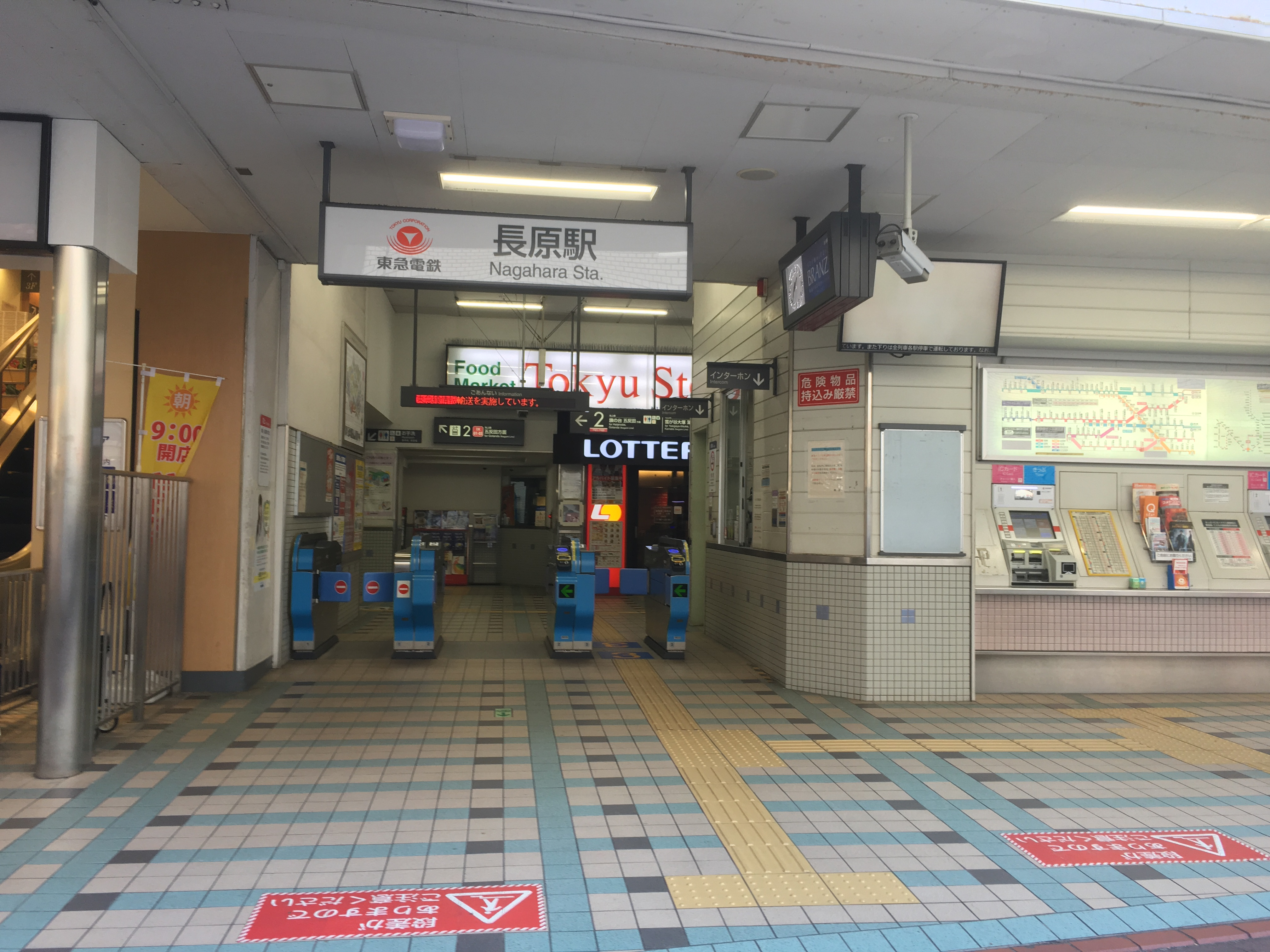 長原駅 (Nagahara Station)